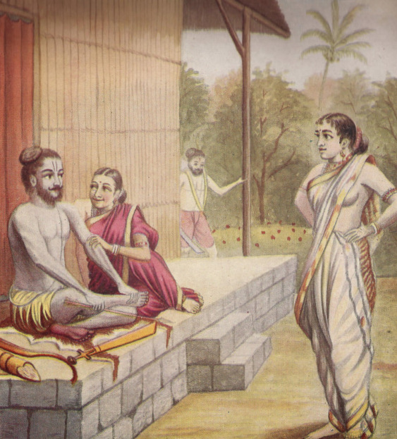 Shurpanakhi Asks for Rama's Love Painting by Balasaheb Pant Pratinidhi